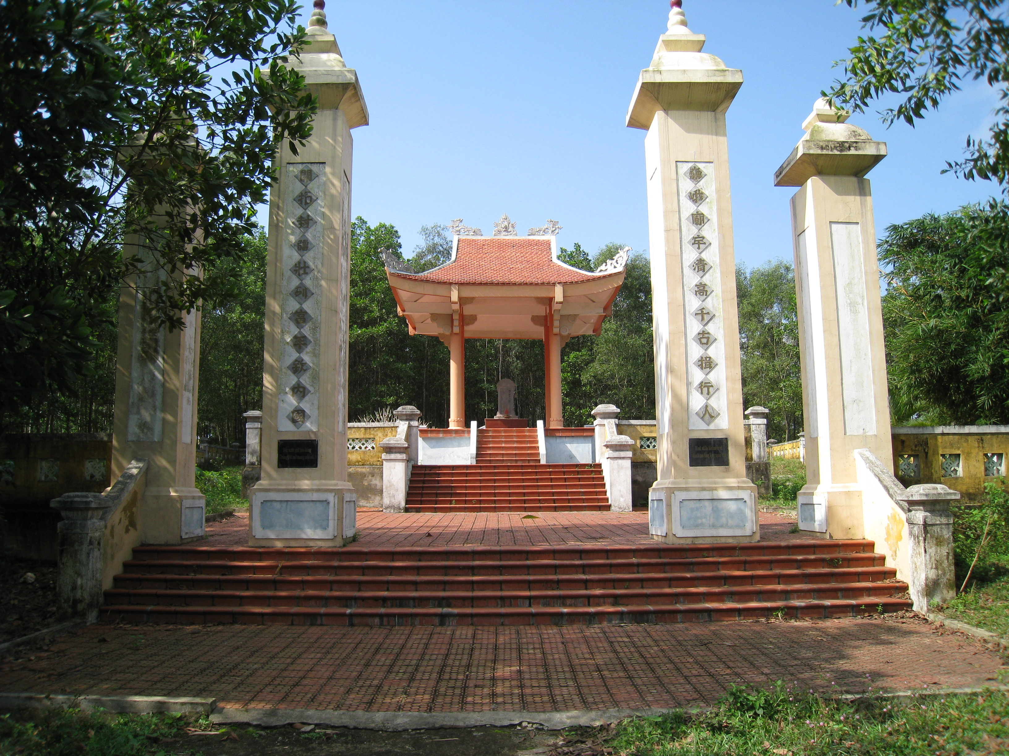 Nguyen Huu Canh Tomb in Le Thuy, Quang Binh, Vietnam